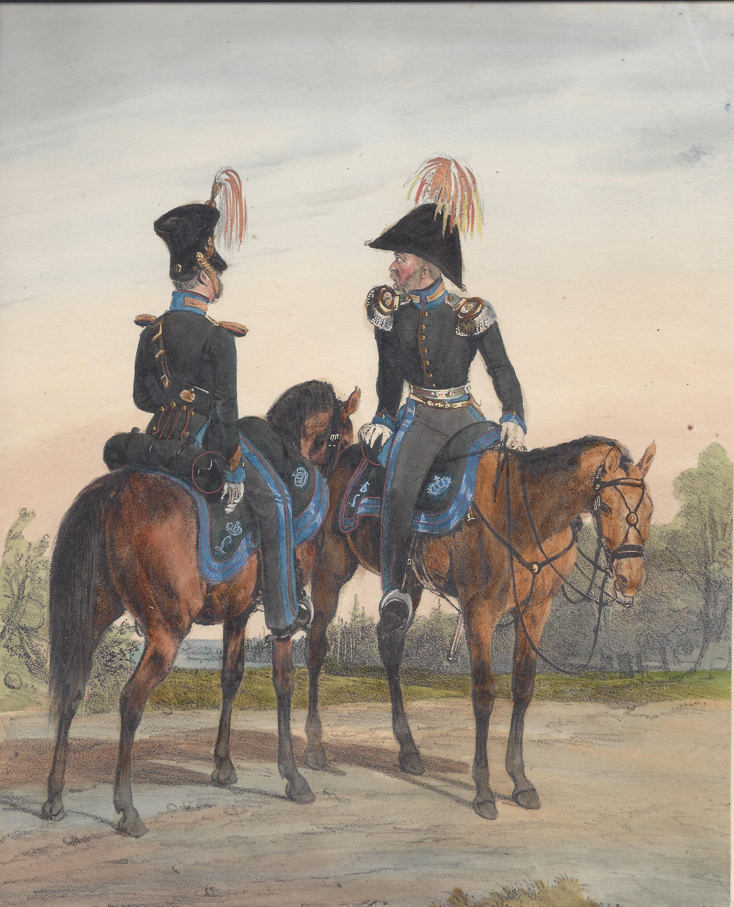 Heinrich Ambros Eckert (1807-1840): Großherzogtum Baden Gendamerie, Lithografie aus: Sämtliche Truppenverbände Europas in Zusammenarbeit mit Dietrich Monten.bei Christian Weiß in Würzburg, 1838-1843.